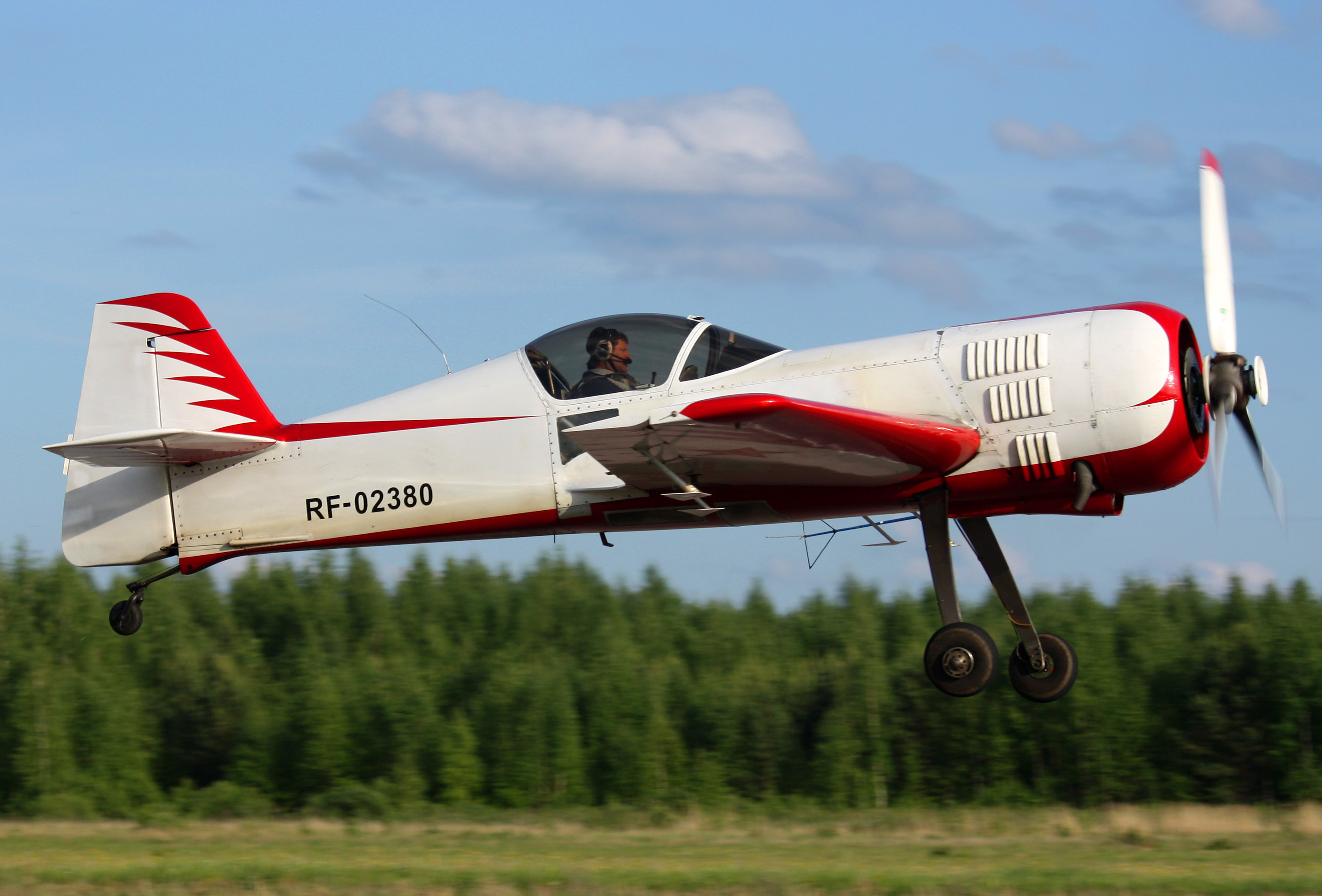 Sukhoi Su-26